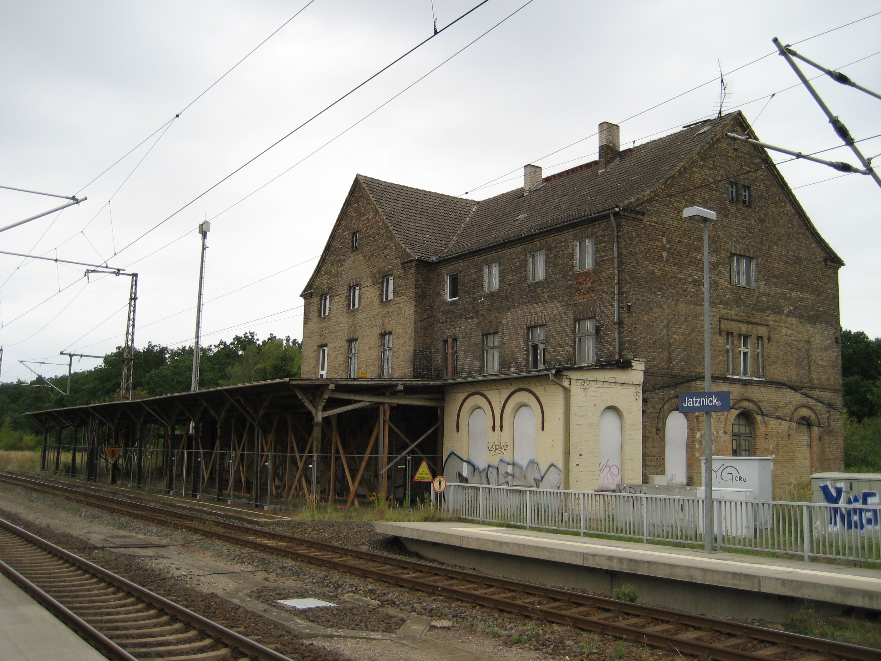 Der Bahnhof in Jatznick.